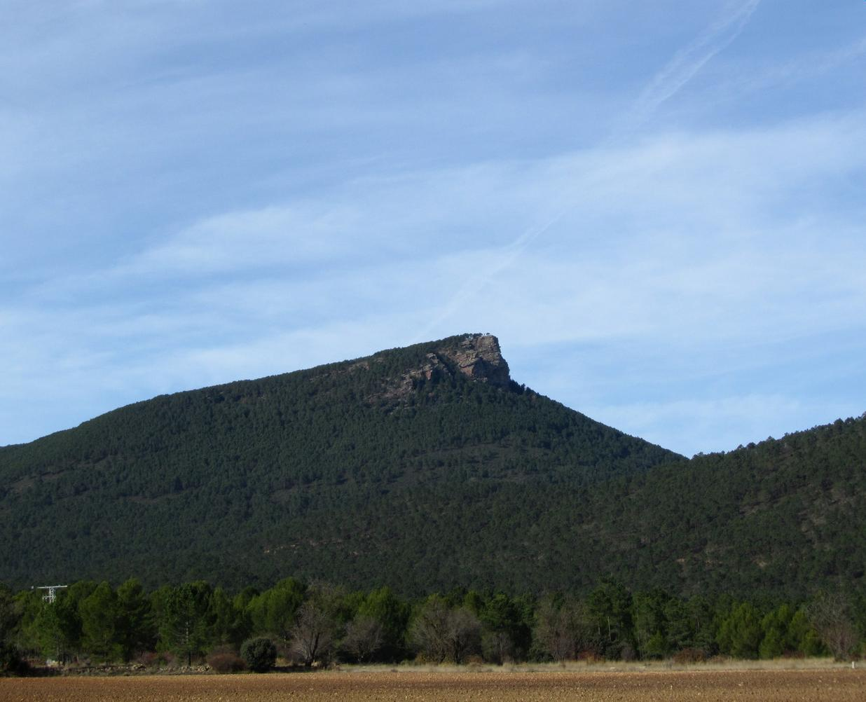 El Pico de Ranera, sierra de Mira, Sistema Ibérico, península ibérica. Se encuentra situado cerca de la localidad de Casillas de Ranera, en la provincia de Cuenca, España.